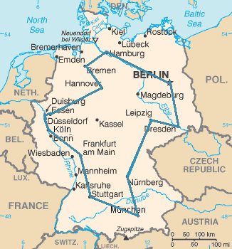 Kürzester Rundreiseweg durch die 15 größten Städte Deutschlands (14 sind genannt, Dortmund fehlt). Insgesamt sind 14!/2 = 43.589.145.600 verschiedene Wege möglich.